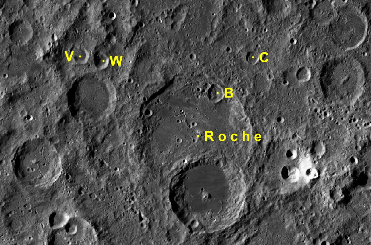 Cráter lunar Roche. Cráteres satélite. (Imagen LRO)